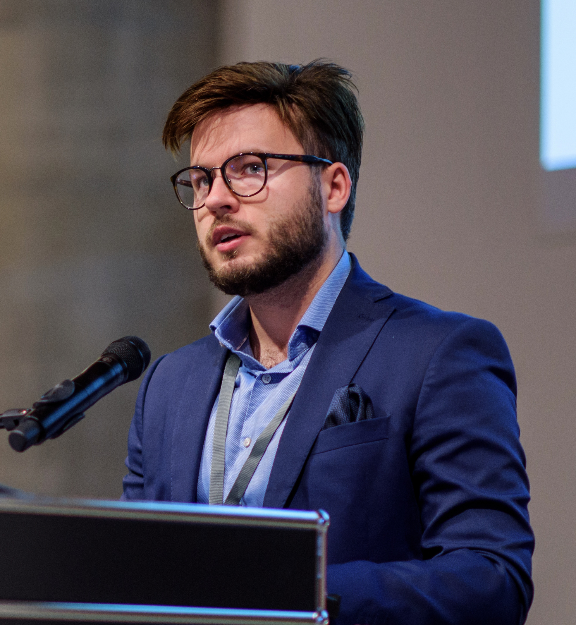 Bart Staszewski podczas wręczenia nagrody "Toleranti" 2019, Szwajcaria